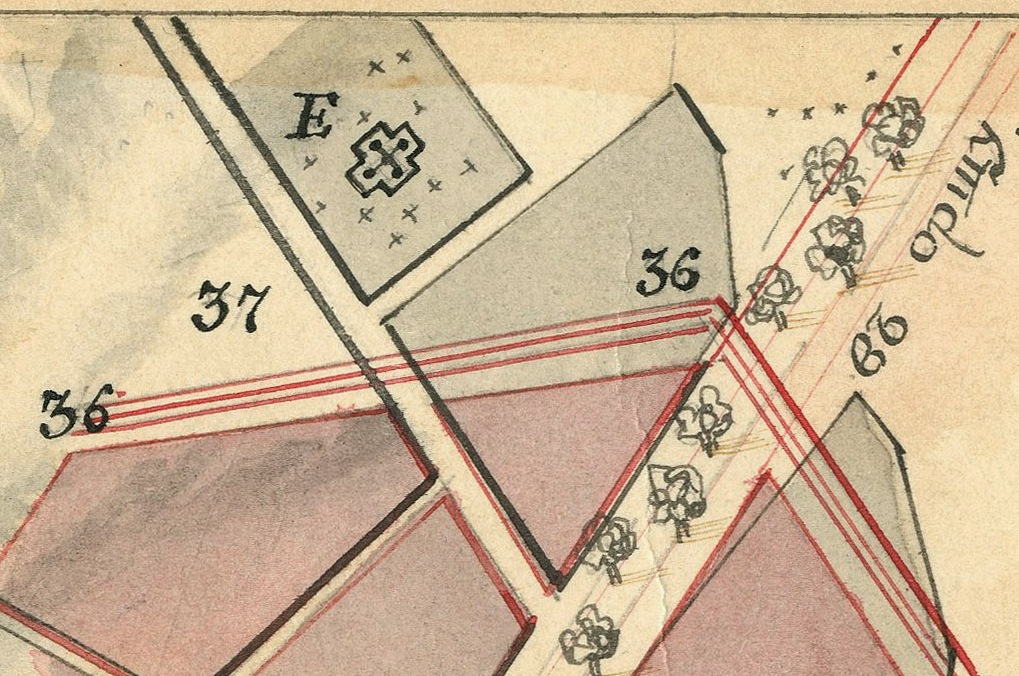 Беларуская (тарашкевіца): Магілёў (Магілёў). Плян места